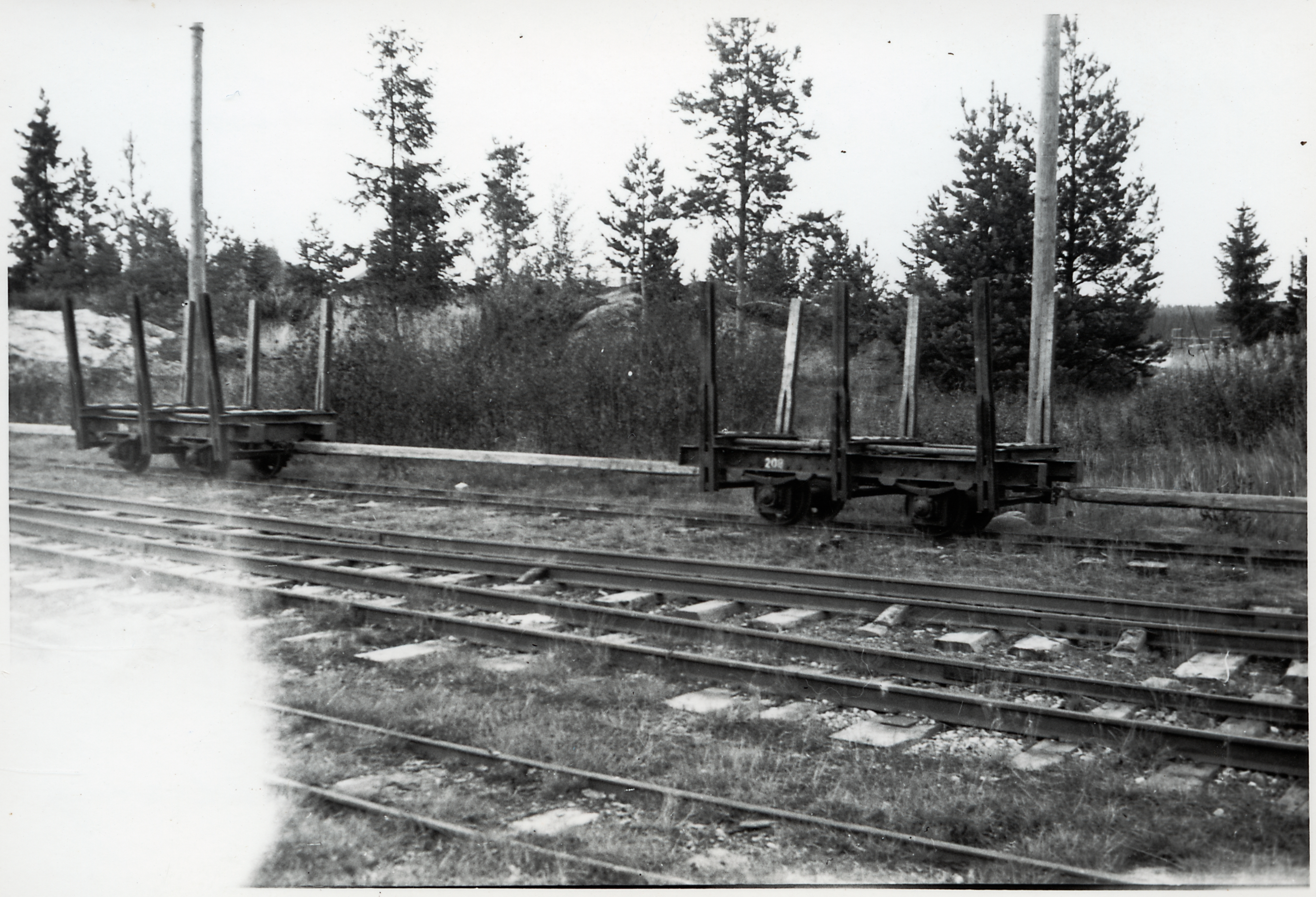 Text på baksida: "Robertsfors-Sikeåhamn j", "Sept. 1957", "Vagnen, hop kopplade med stång", "Sikeåhamn", "G. Östberg". Text på kuvert: "Sikeåhamn", "Historik Ej", "Robertsfors-Sikeåhamns Järnväg".